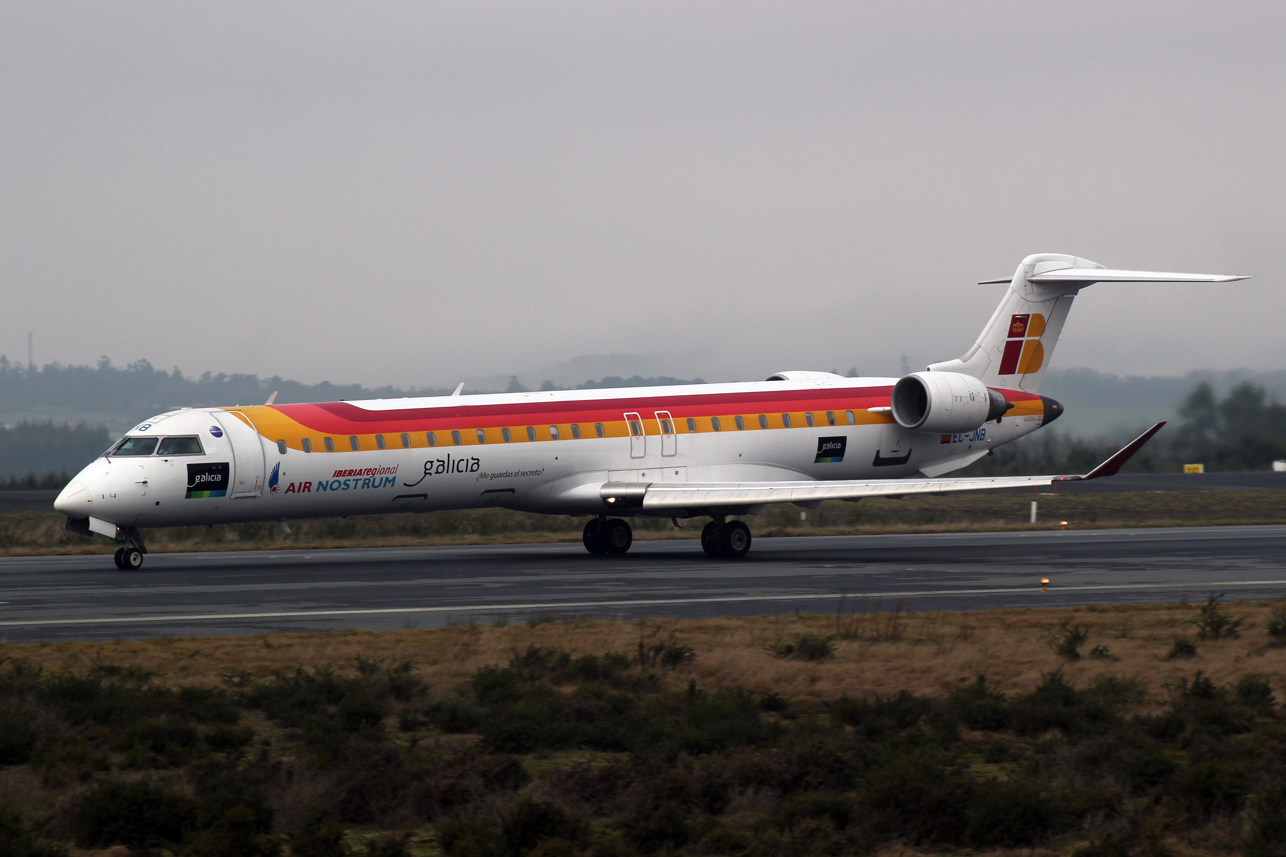 CRJ-900 de Air Nostrum despegando do aeroporto de Santiago de Compostela.